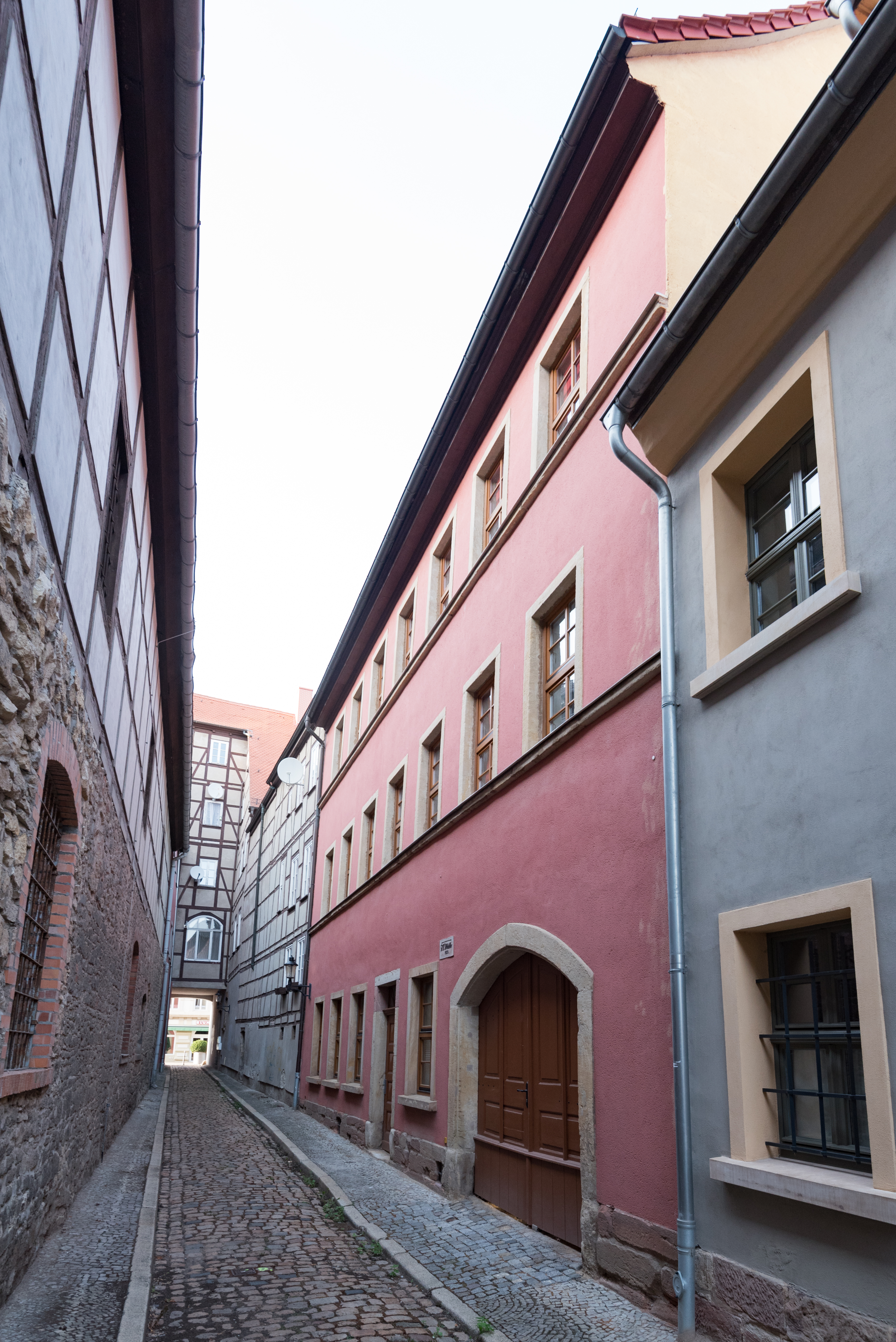 Naumburg (Saale), Jüdengasse 1